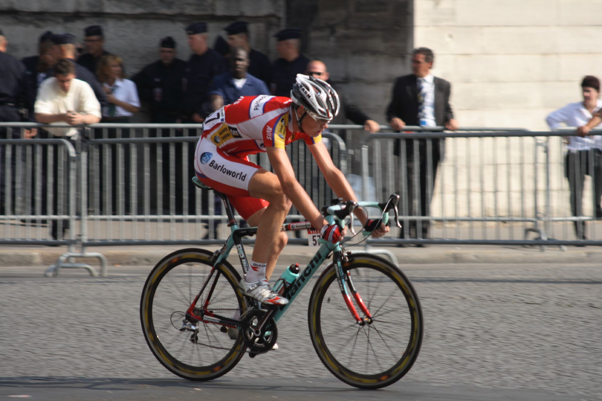 TourDeFrance2008_0029